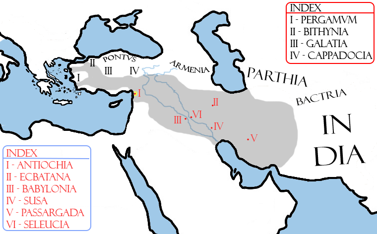 Limes regnum Seleuciarum in anno 530 ab urbe condita, quando Anthiocum regem factus fuit.